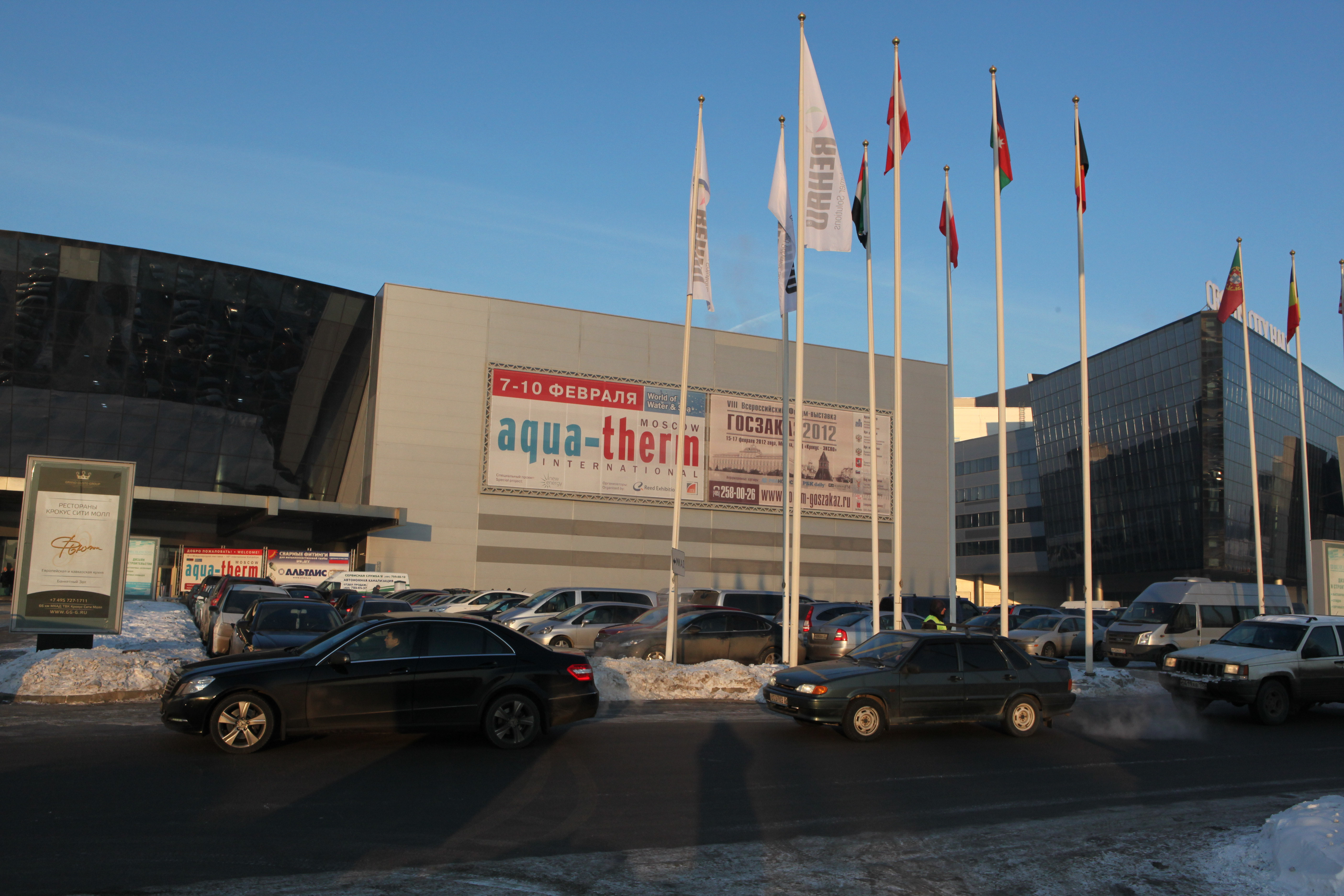 Выставка проходит в Крокус Экспо